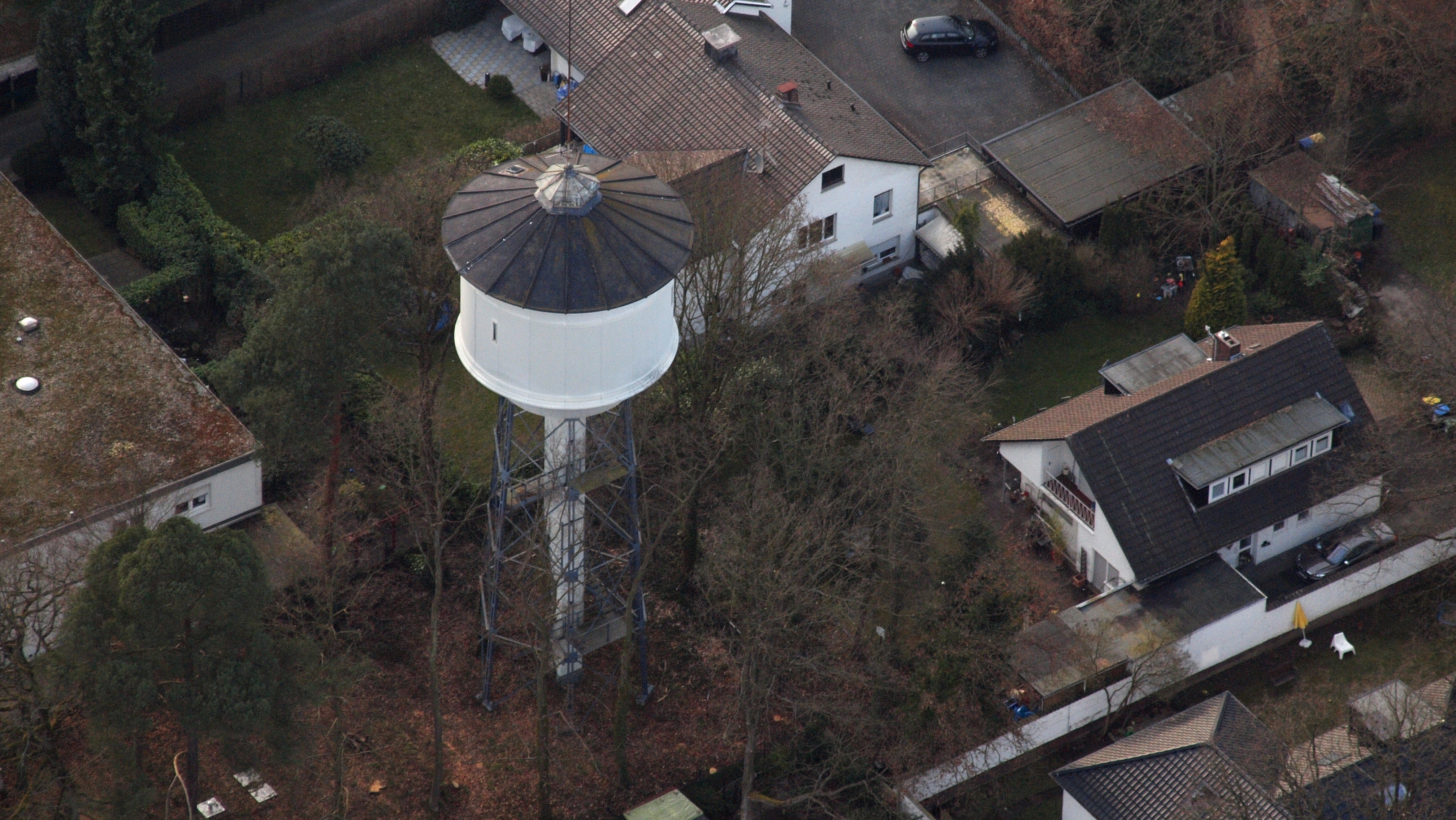 Wasserturm, Waldstraße, Bonn-Schweinheim: Luftaufnahme